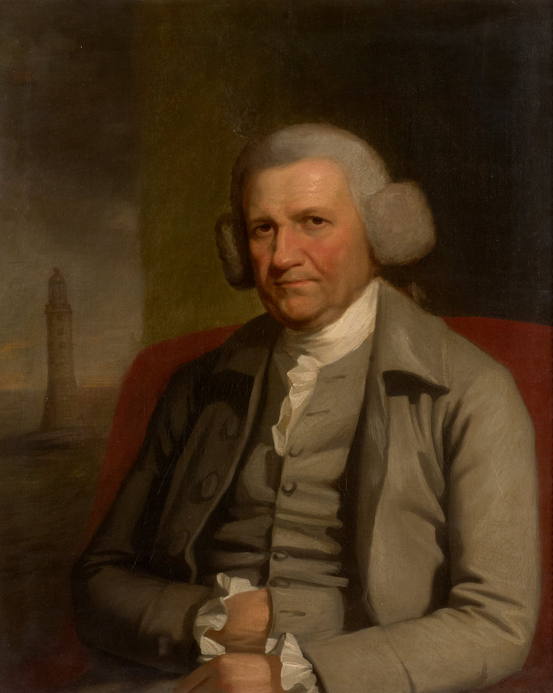 Гравюра портрету Джона Смітона, зроблена з портрету роботи маляра Матера Брауна (Mather Brown). Портрет було передано Королівському науковому товариству у 1799 році членом Товариства Олександром Обертом (Alexander Aubert). У листі до Товариства О. Оберт зазначав, що портрет був дуже схожим на Джона Смітона. Portrait of John Smeaton на сайті The Royal Society. From here